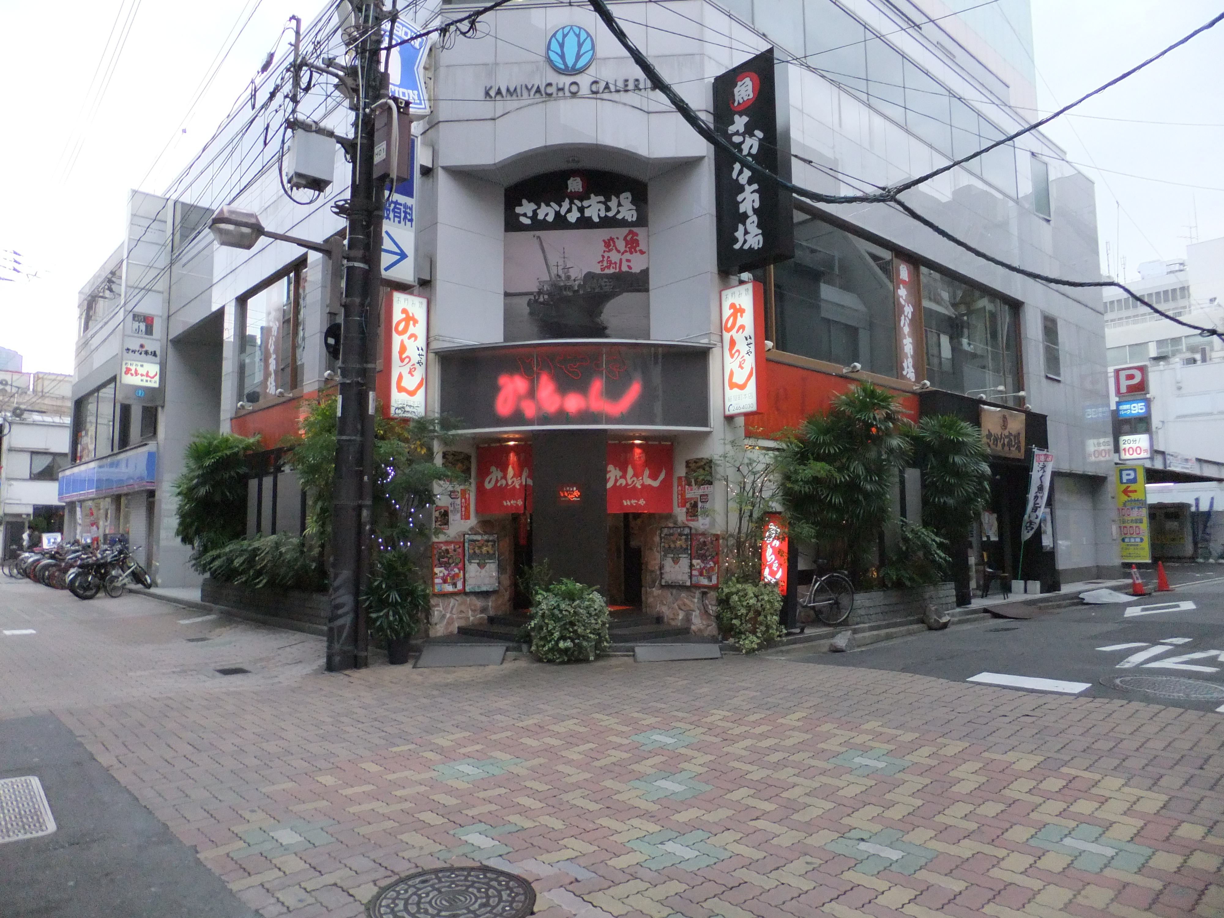 みっちゃんいせや